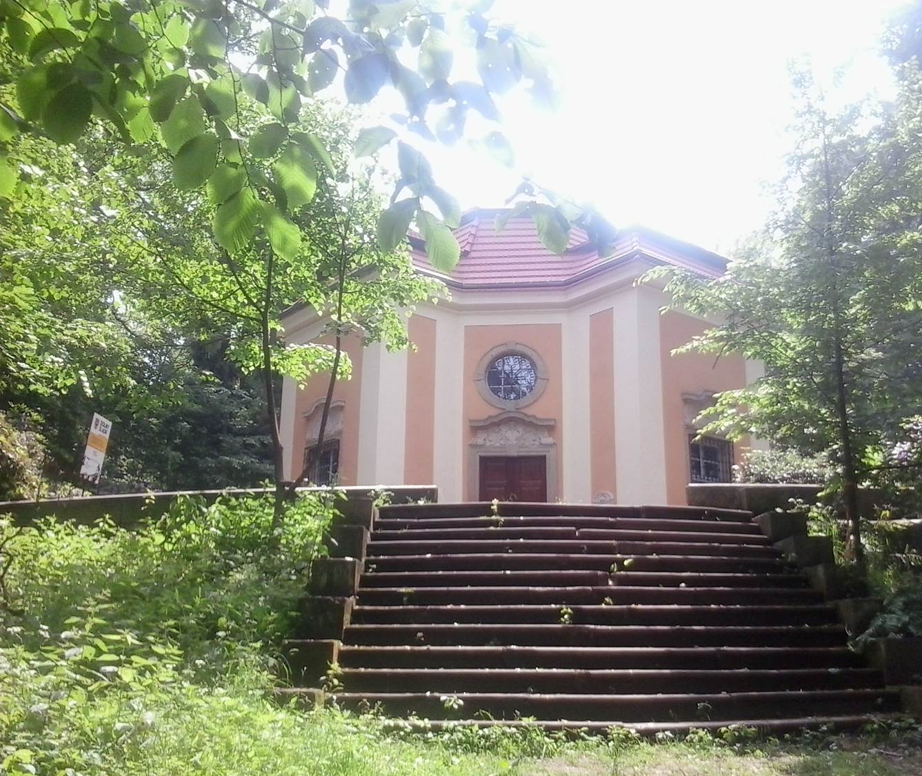 Mauzoleum Hochbergów mieszczące się w Wałbrzychu.